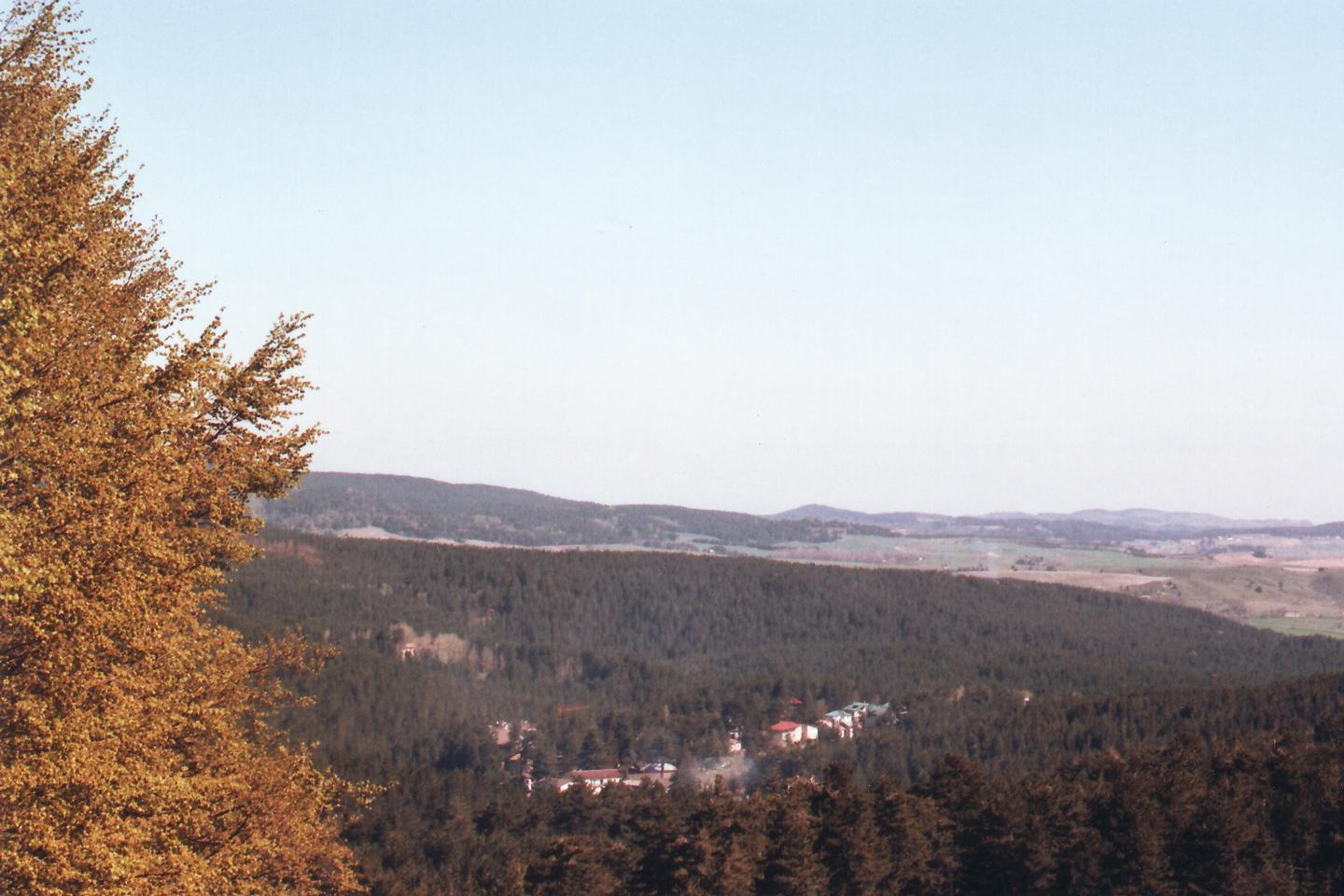 Autore della foto: Bruno Francesco Pileggi